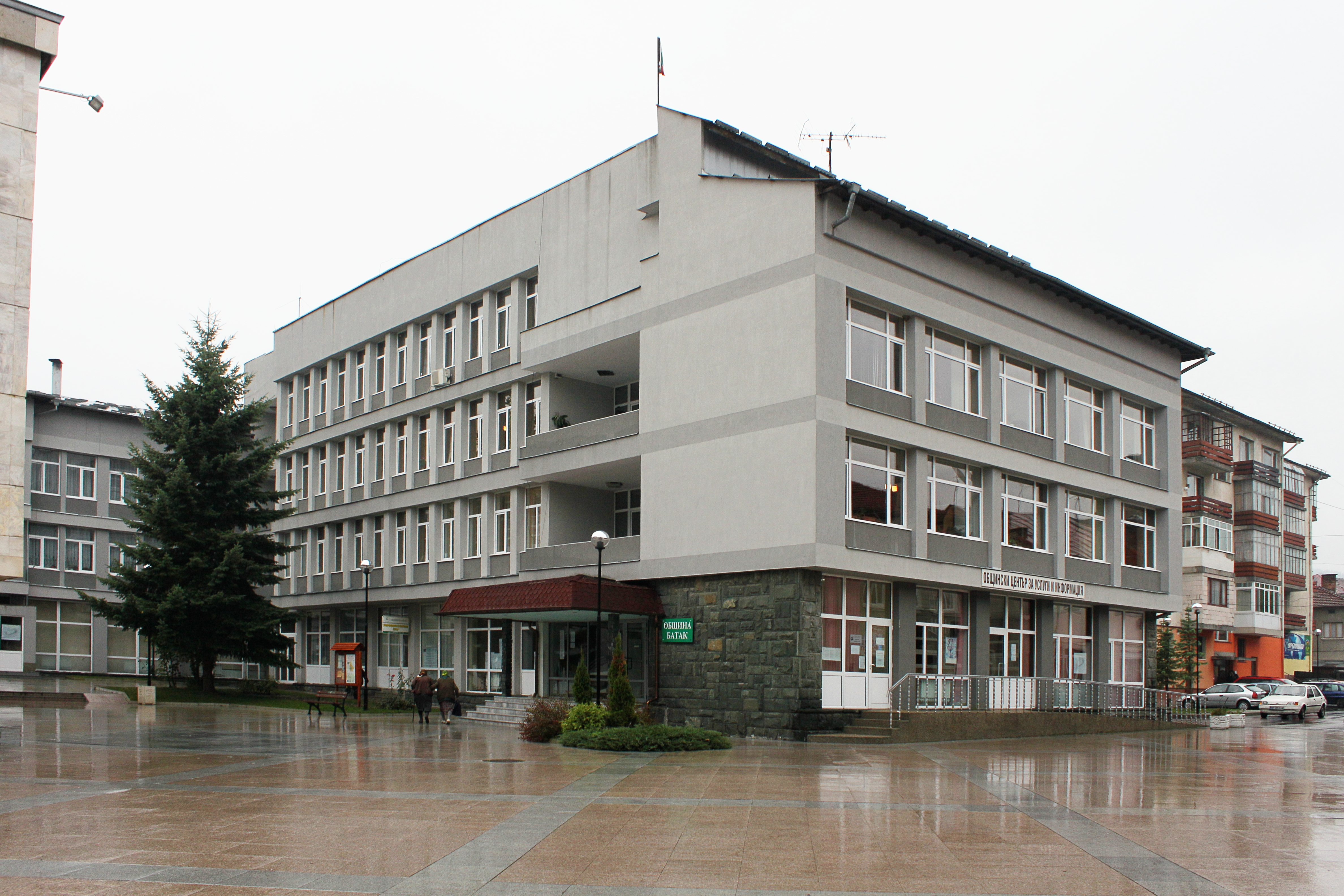 Batak, Bulgarien